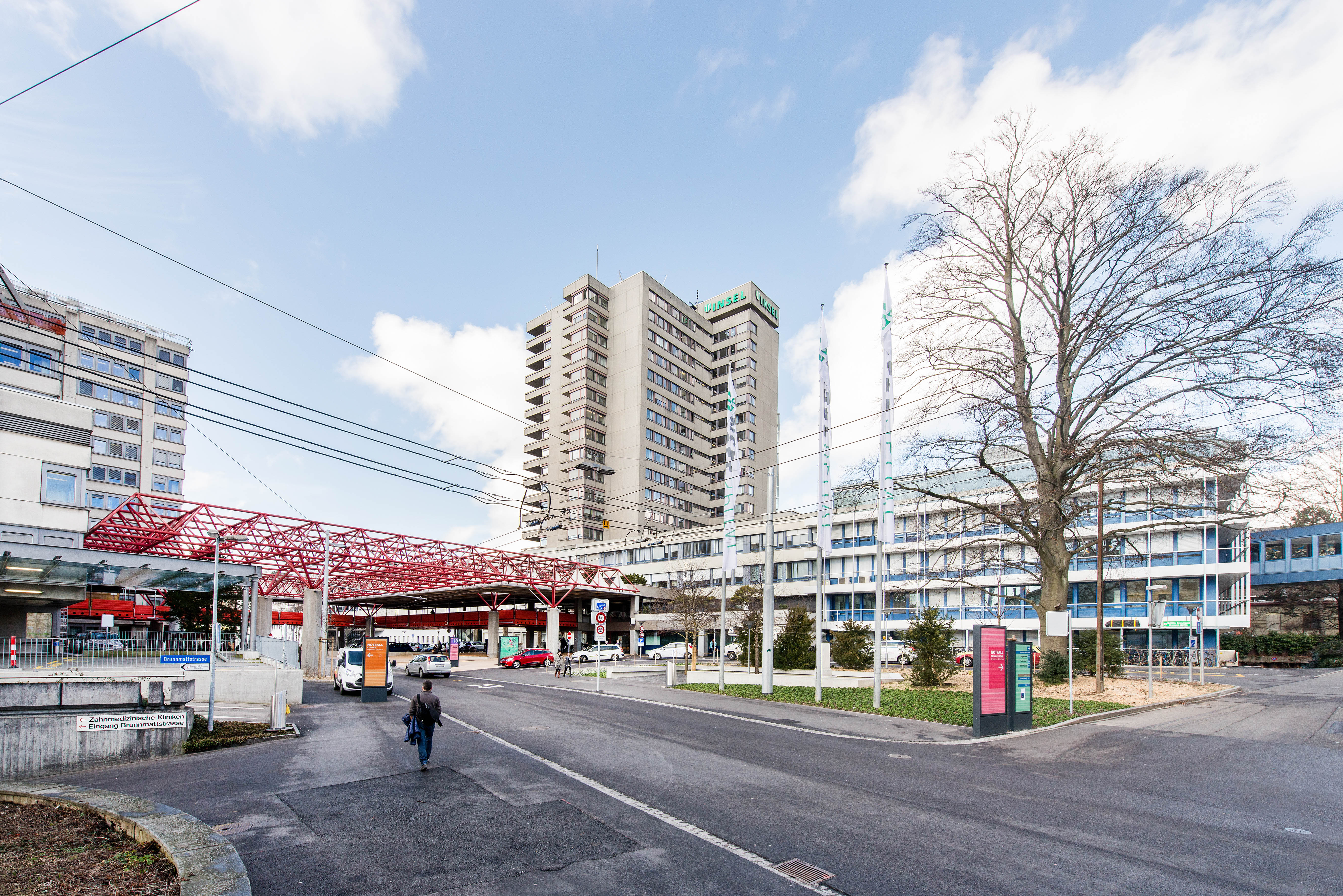 Inselspital Bern mit Bettenhochhaus und Kinderklinik, 2016